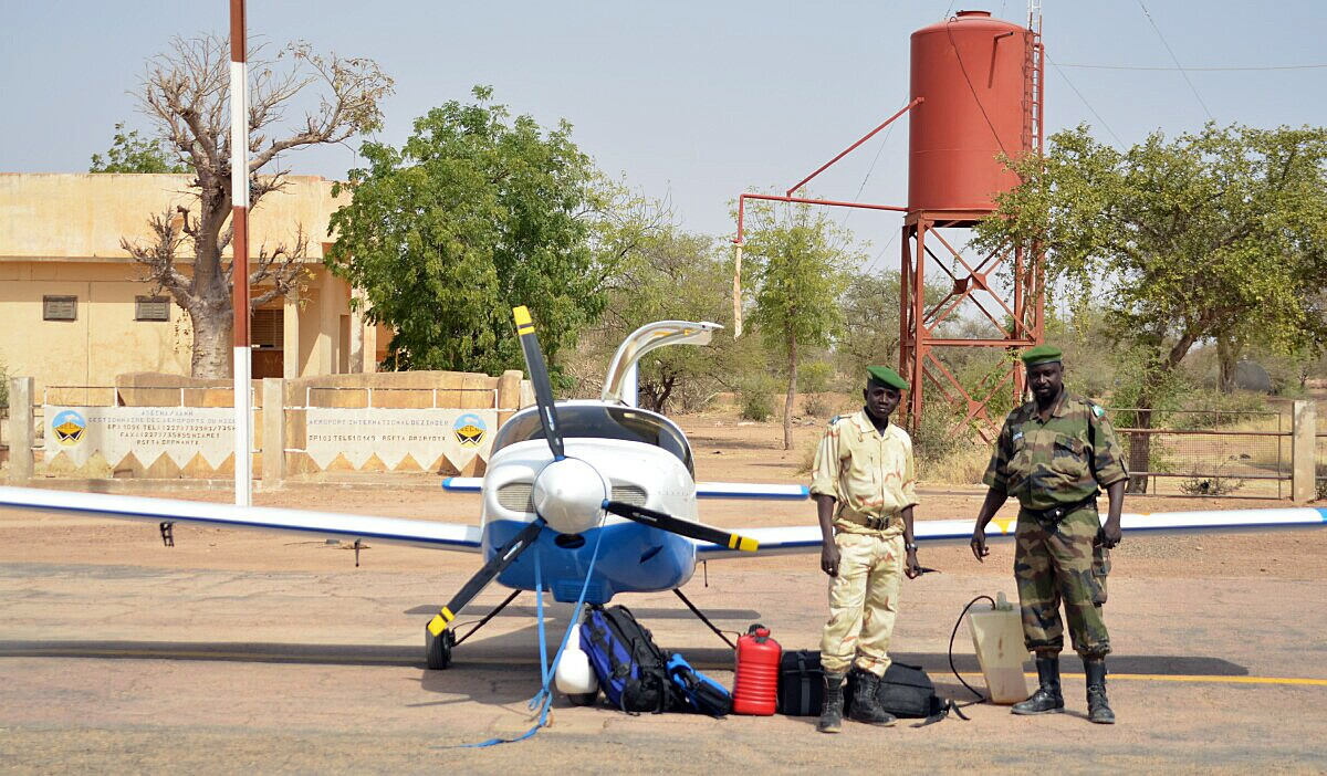 N81EU in Zinder, Niger